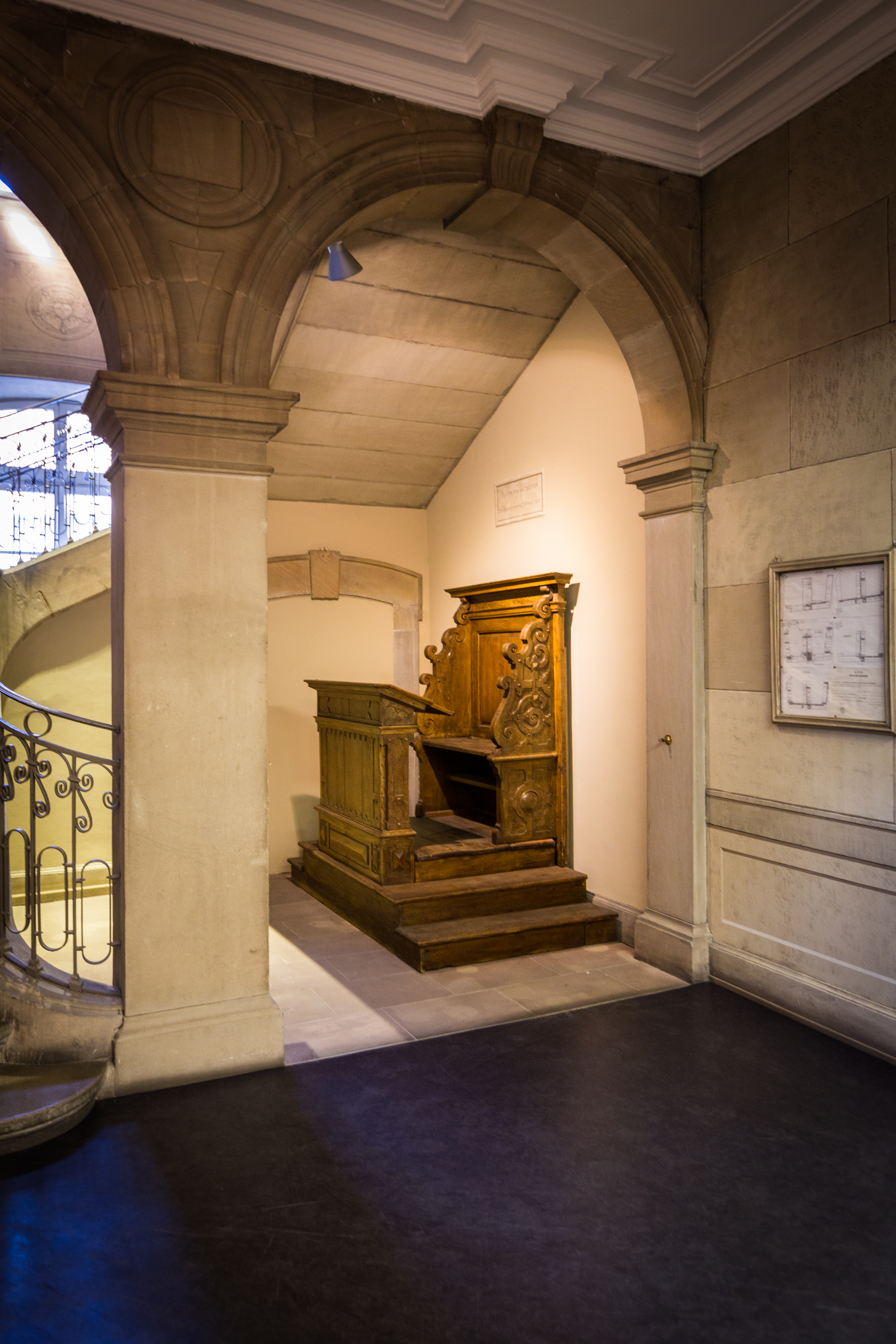 Strasbourg Gymnase Jean-Sturm avril 2014